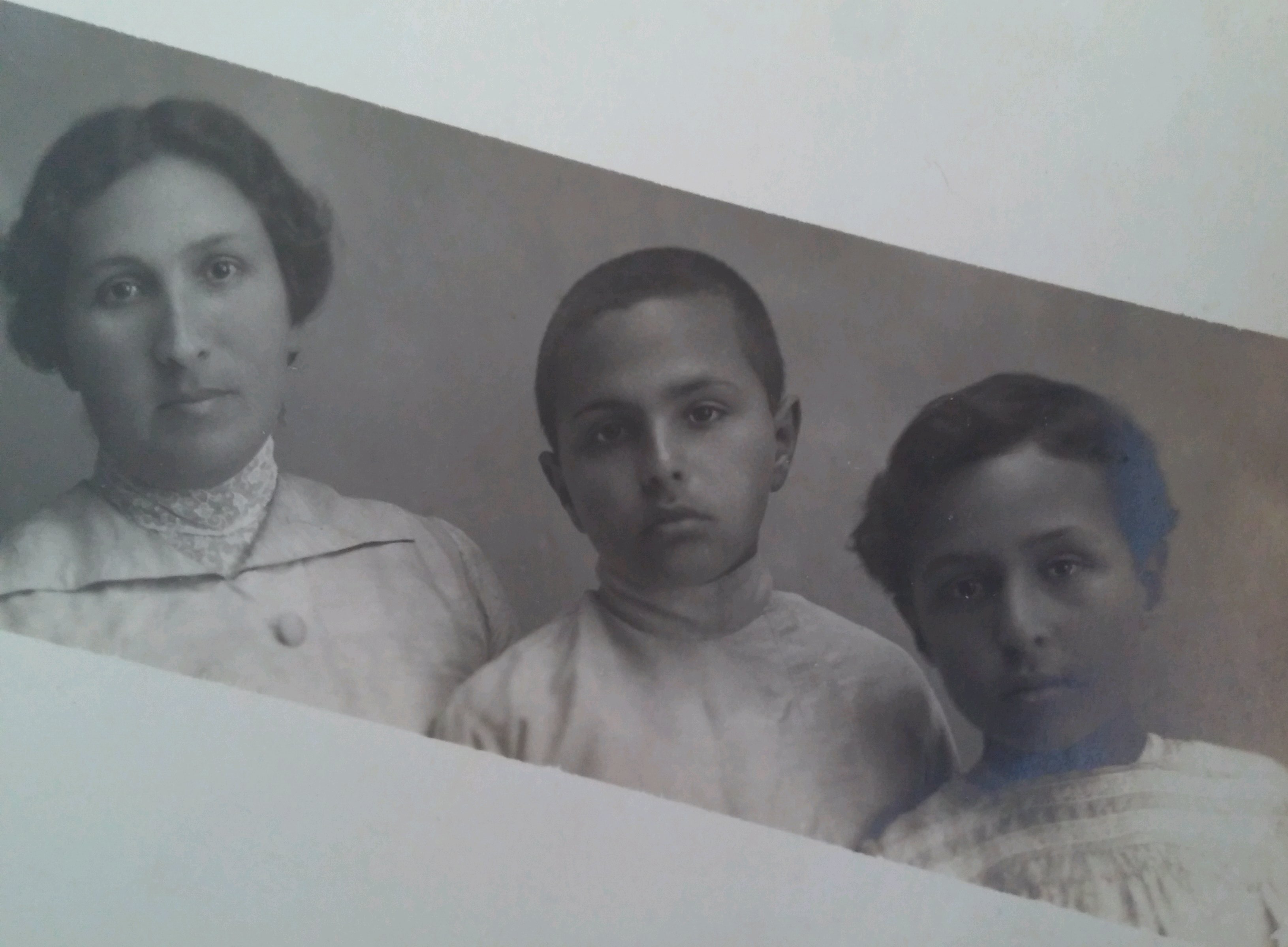 שרה עזריהו עם ילדיה יעקב ותחיה- 1914